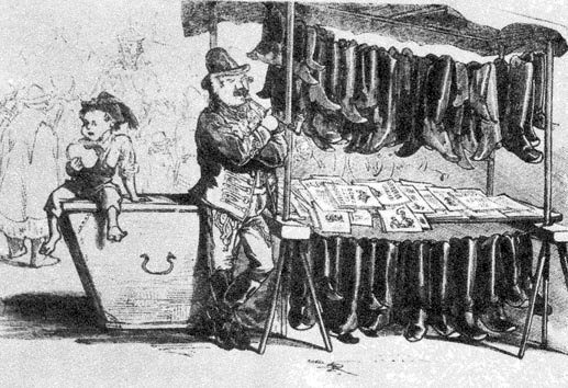 Vásári könyvárusítás karikatúrája